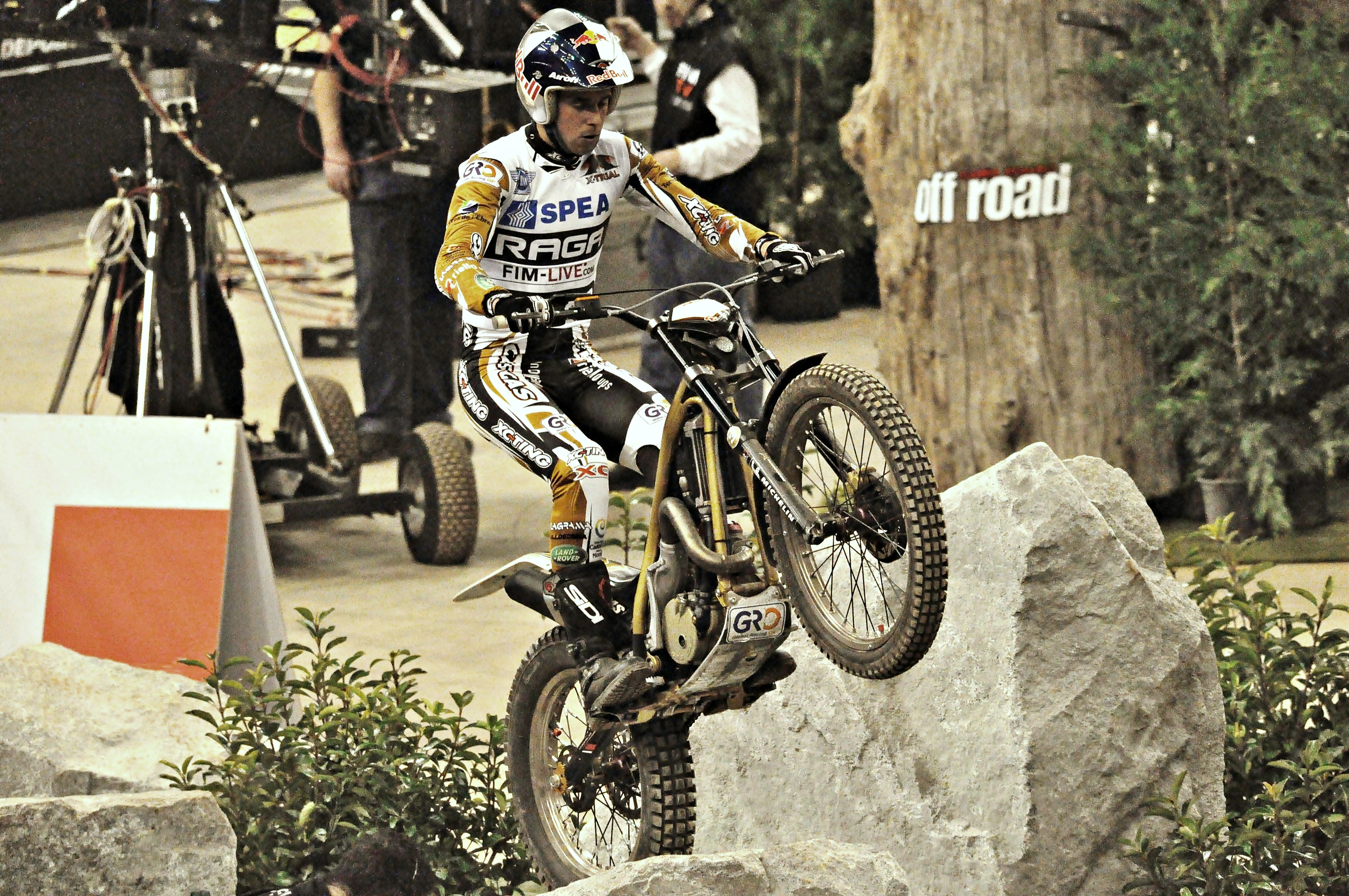 trial indoor de barcelona-2011